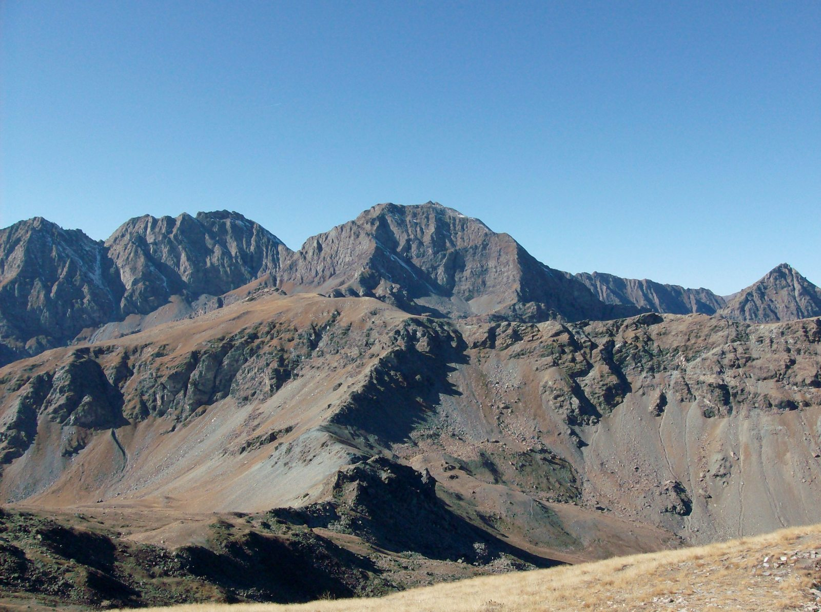 Versante orientale del monte Meidassa salendo alla Sea Bianca dal Colle della Gianna